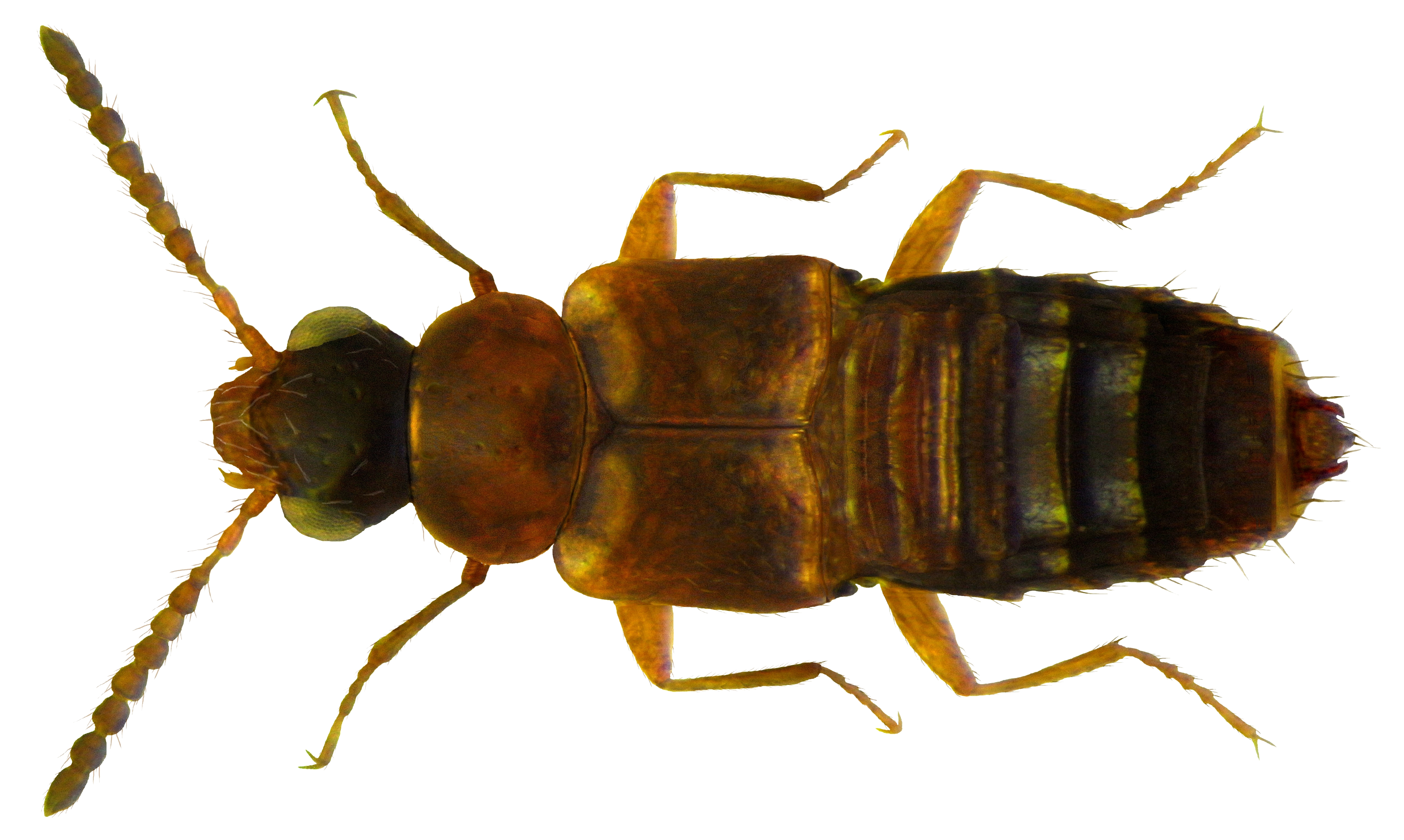 Familie: Staphylinidae Groesse: 1,8-2,3 mm Verbreitung: Europa Oekologie: an Pilzen Fundort: Germania, Bayern, Unterfranken, Schweinfurt leg.det. U.Schmidt, 1981 Photo: U.Schmidt, 2011